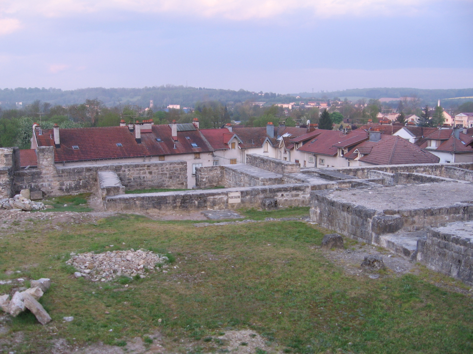 Châtel-sur-Moselle, Vosges, may 2006